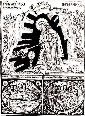 Марко Печерник (Гробокопач) - XI-XII ст. Святий Марко Гробокопач (Saint Mark the Gravedigger of Kyiv Caves, 12 cen., Ukraine) - чернець Печерського монастиря. Преподобний. Пам'ять 11 жовтня і 11 січня. Прп.Марко копав для померлої братії могили в печерах, тому й має прізвисько Гробокопач. Він був учасником перенесення мощей преп.Феодосія в Успенський собор. Марко ніколи не брав грошей за свою роботу, а якщо й одержував щось - роздавав усе бідним. Прославився чудотворіннями, наказуючи померлим вставати і рухатись (історія з Іоаном та Феофілом). Похований у викопаній ним самим печерній могилі. Мощі його спочивають у Ближніх печерах. Зберігся хрест-релікварій, що, за переказом, належав прп. Марку. Життя і чернечий подвиг прп.Марка одержали відображення в монументальних розписах лаврських храмів.